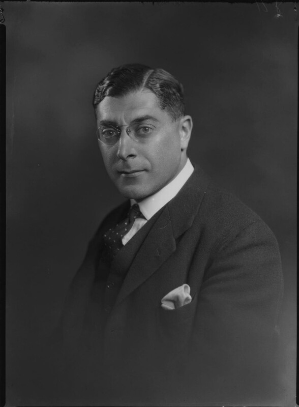 Montagu Lyons